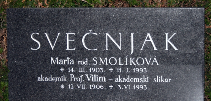 grob Vilima Svečnjaka na Mirogoju u Zagrebu